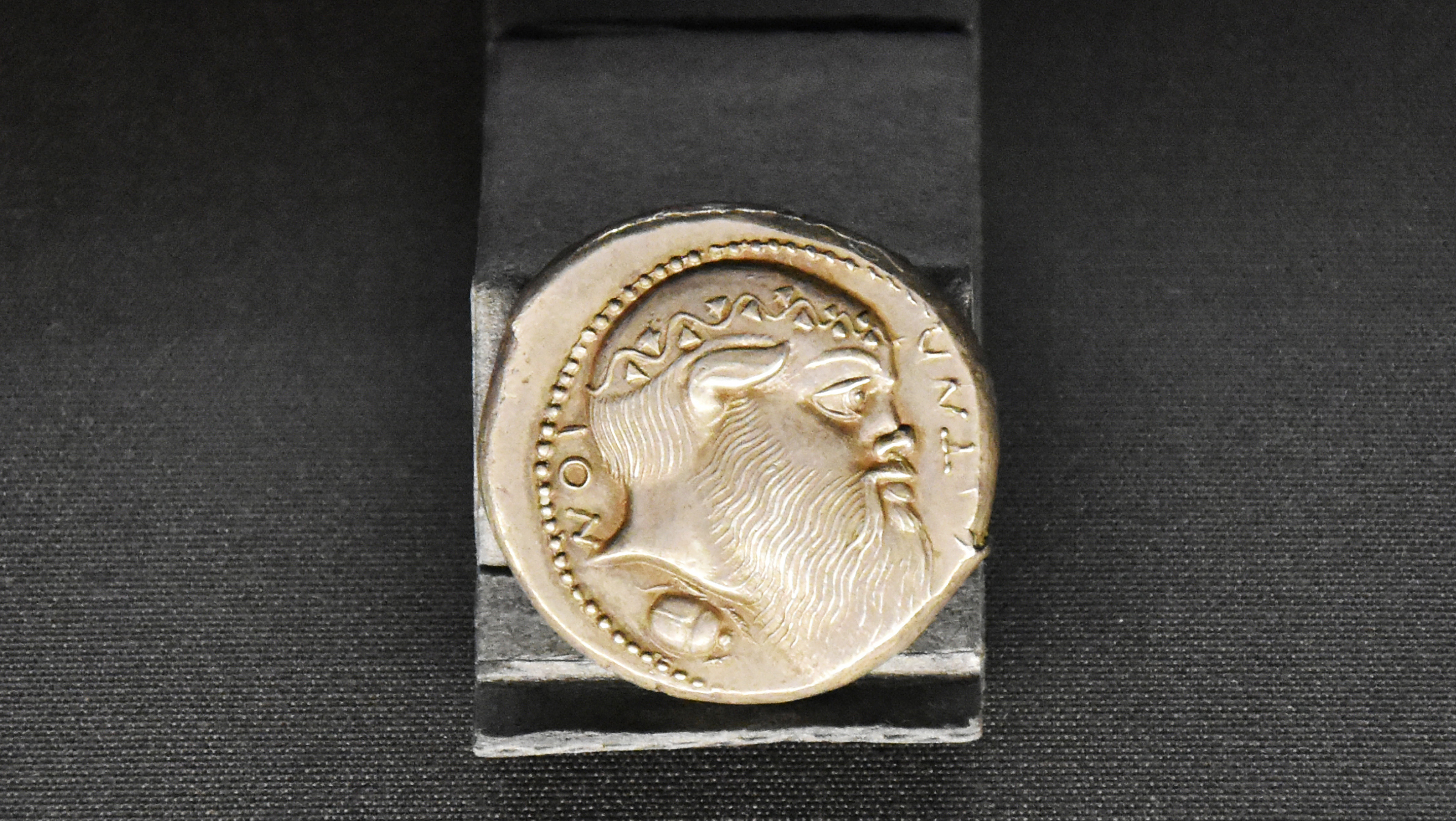 Tetradrachme van Aetna (tweede kwart 5e eeuw v.C.) - zilveren munt (26 mm - 17,23 g), geslagen door de Griekse stad Aetna, vandaag Catania op Sicilië. Op de voorzijde het hoofd van Silenus en een mestkever - op de keerzijde Zeus met zijn linkerhand op een bliksemschicht en met zijn rechterhand leunend op een stok. Deze munt wordt als de kostbaarste ter wereld beschouwd. This is a file created at the museum: Royal Library of Belgium in Brussels